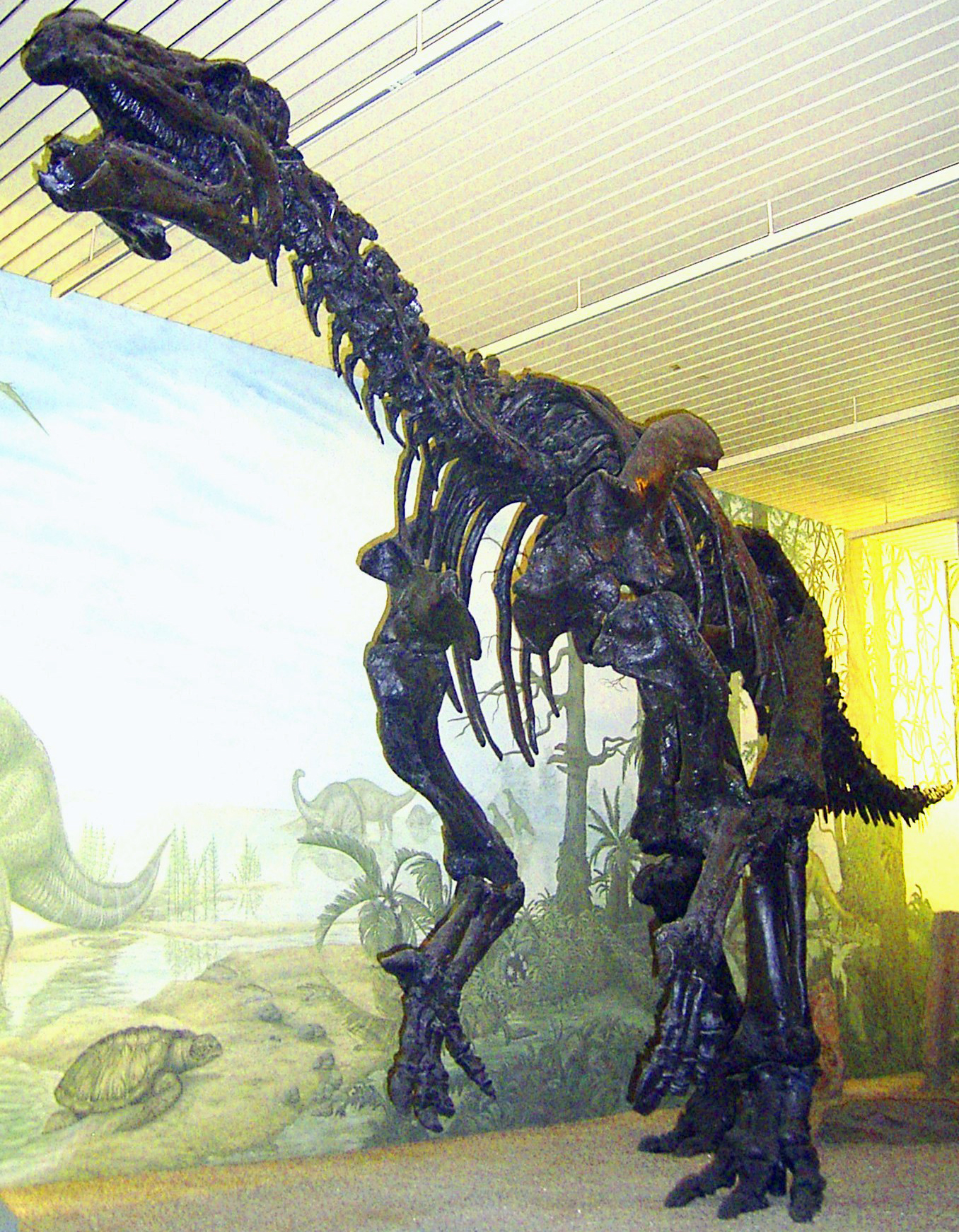 Abguss eines Iguanodonskeletts im Überseemuseum Bremen